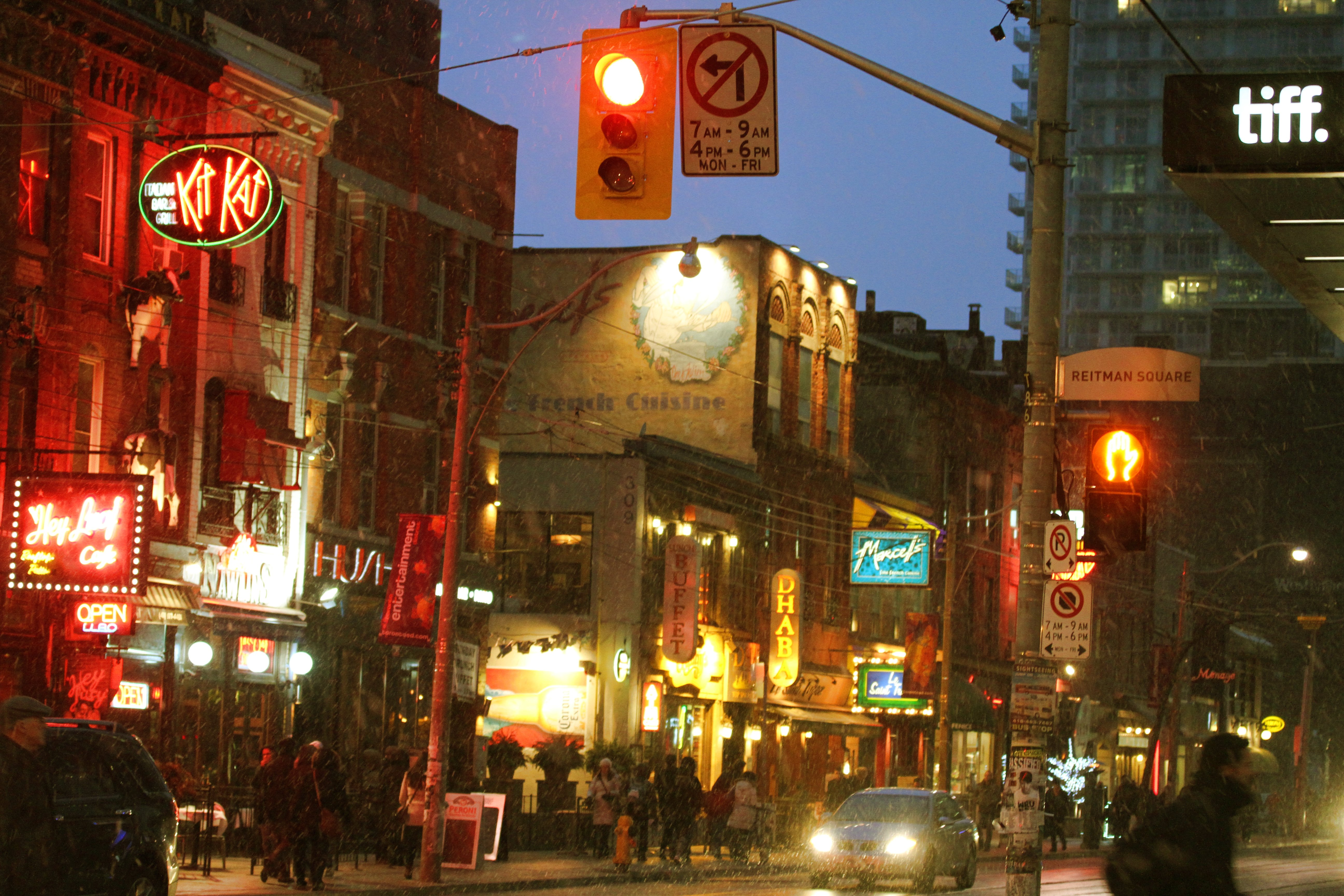 brands